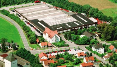 Luftbild des Firmengeländes der Holmer Maschinenbau GmbH in Schierling (Eggmühl), 1996